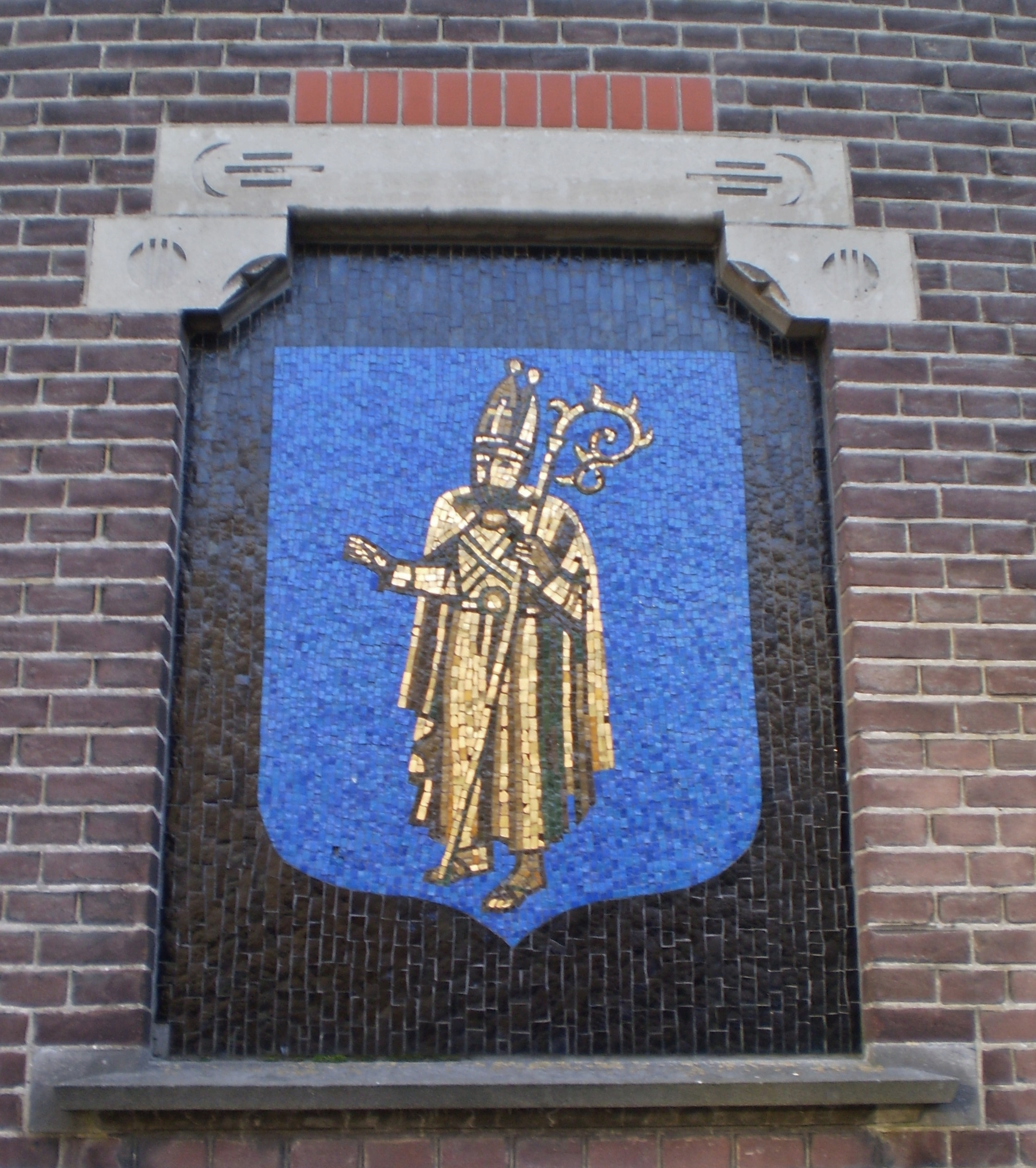 Mozaïek van Elly Meijer aan de gevel van het oude gemeentehuis. Het gemeentewapen van Baarn. Uit 1970 nadat de gemeenteraad had besloten het oude gemeentewapen weer in te voeren